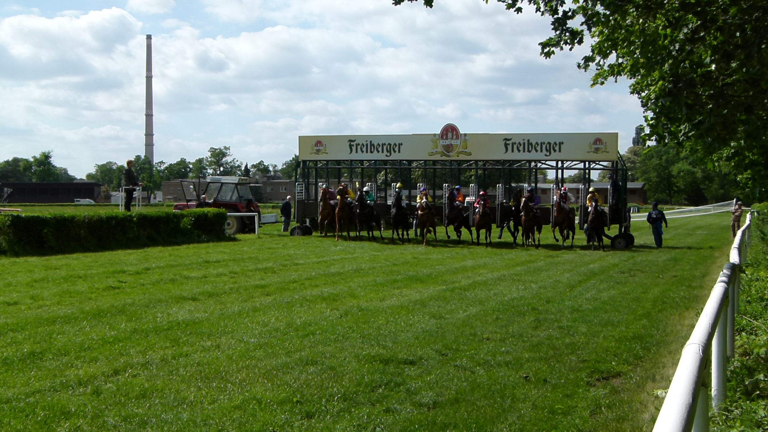 Seidnitzer Pferderennbahn, Seidnitz, Dresden